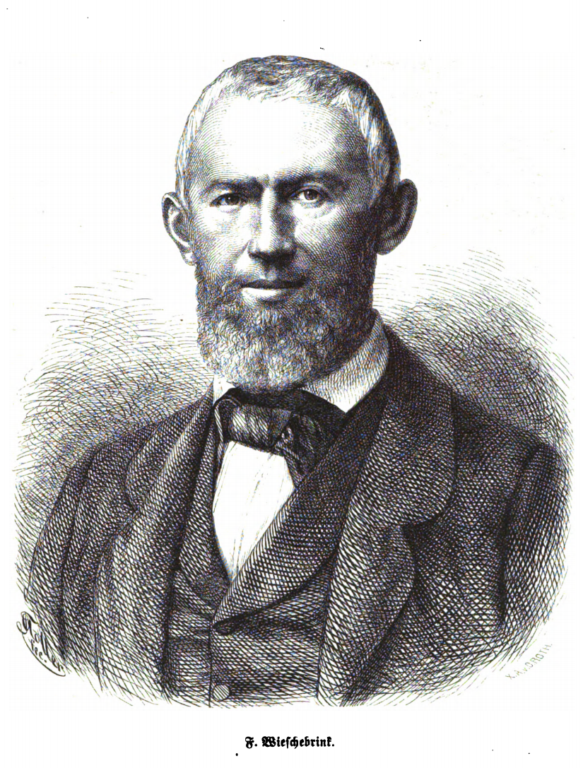 Portrait des Malers Franz Wieschebrink, 1868